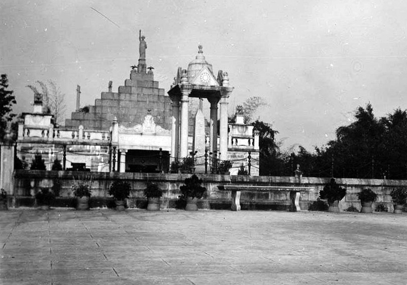 1930年代，廣州市黃花崗七十二烈士墓紀功坊。